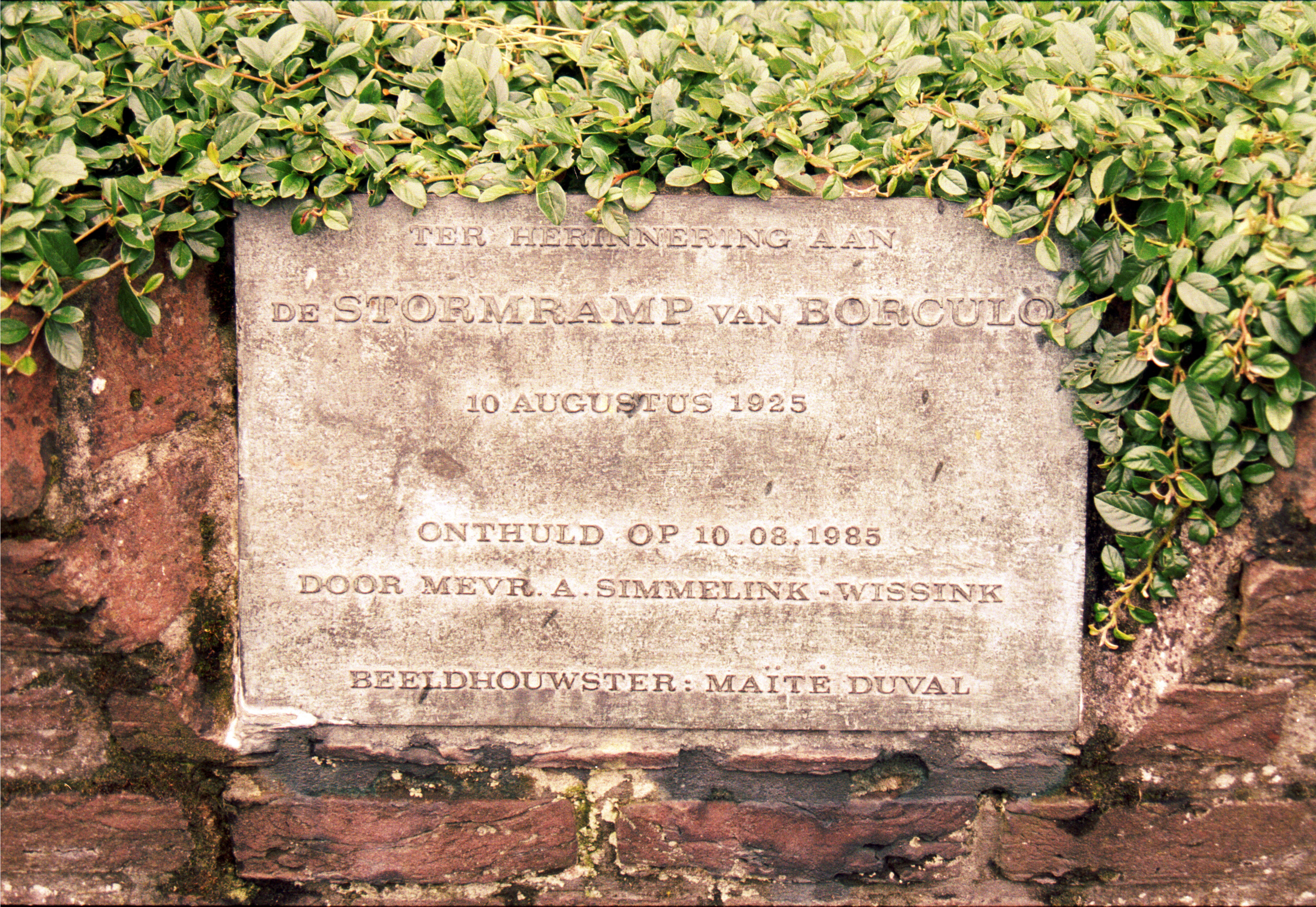 Plaquette accompanying the monument in Borculo